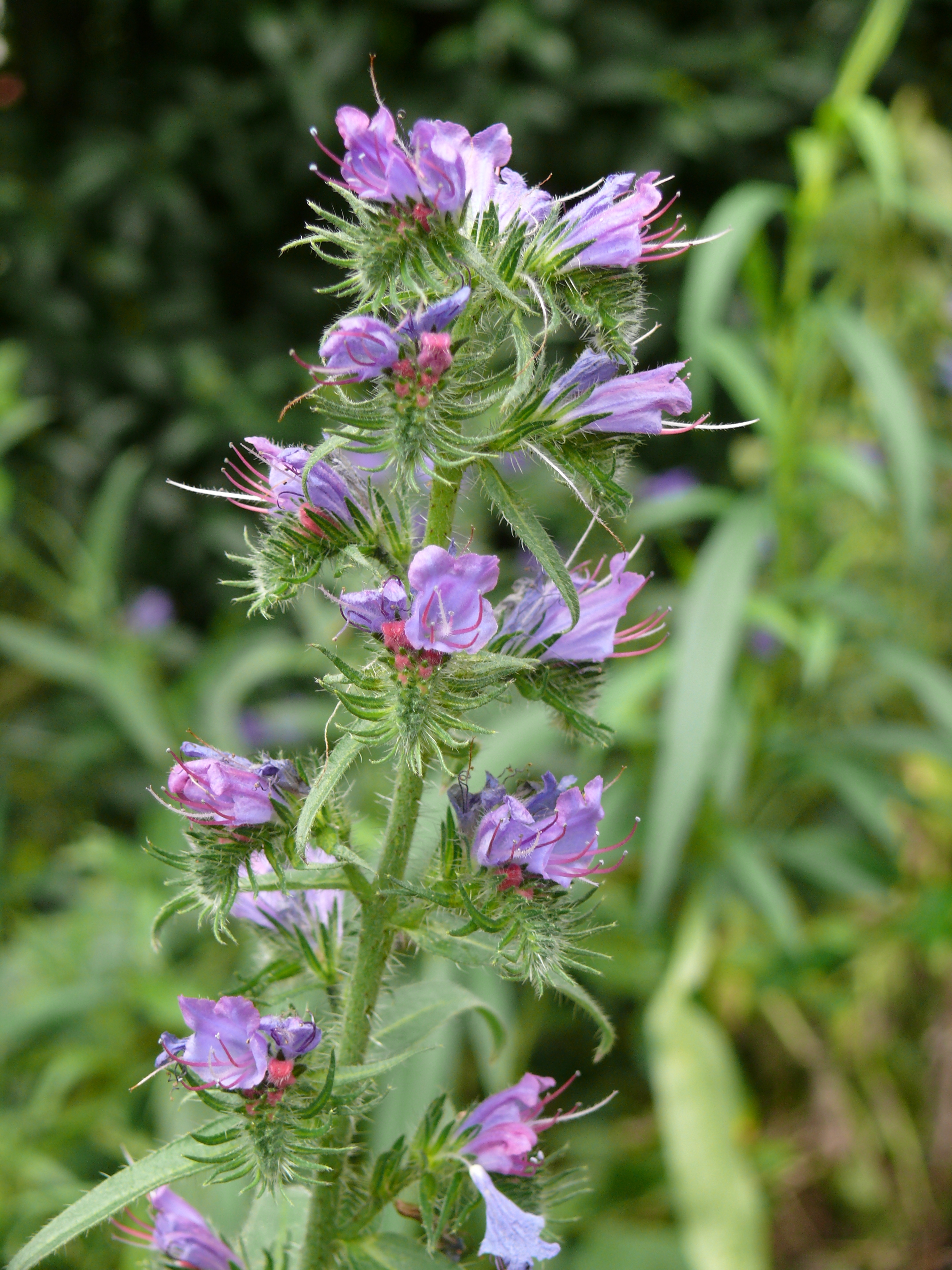 Echium vulgare